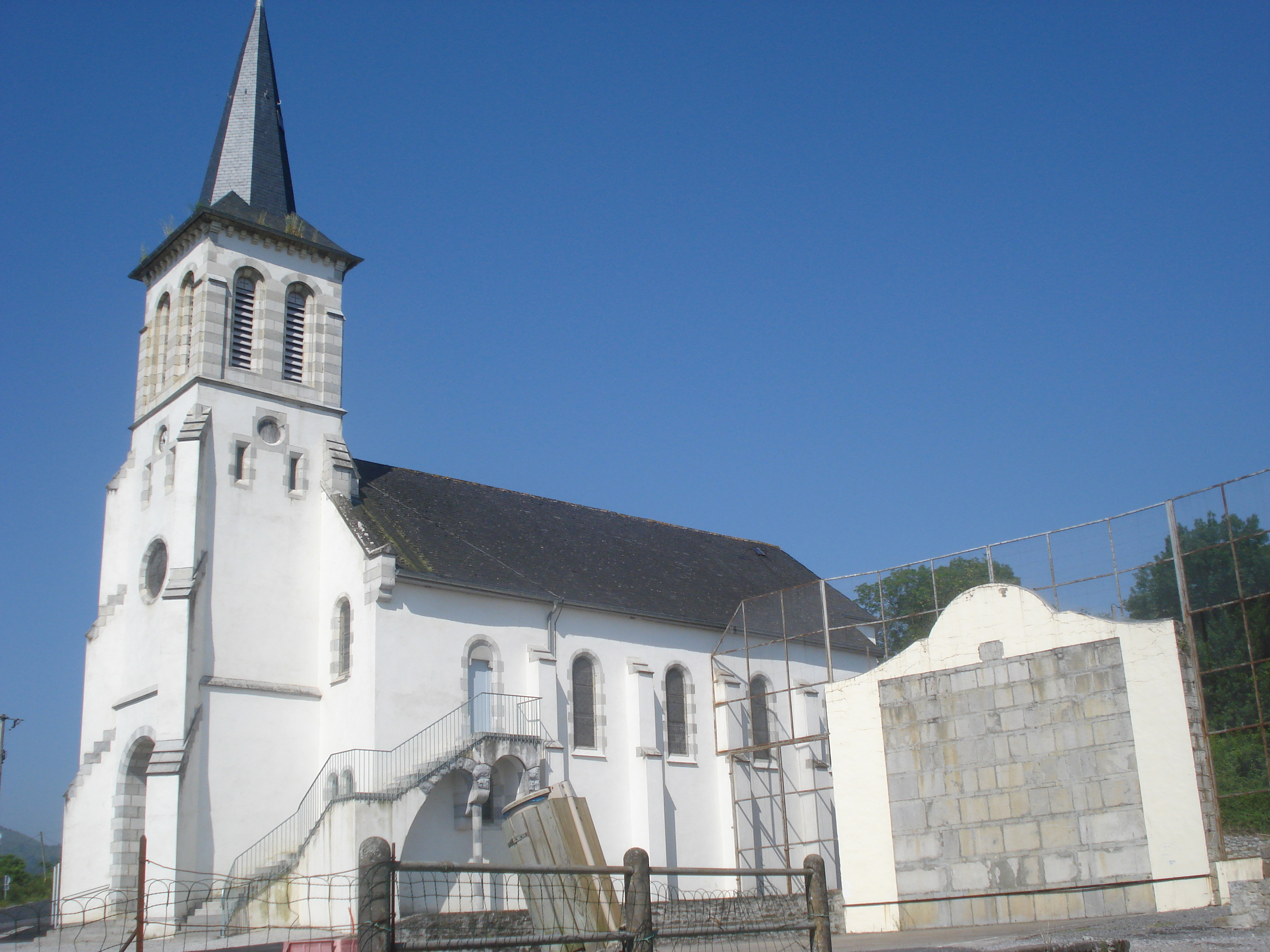 Ostabat (Basse Navarre, Pyrénées-Atlantiques 64) église et fronton